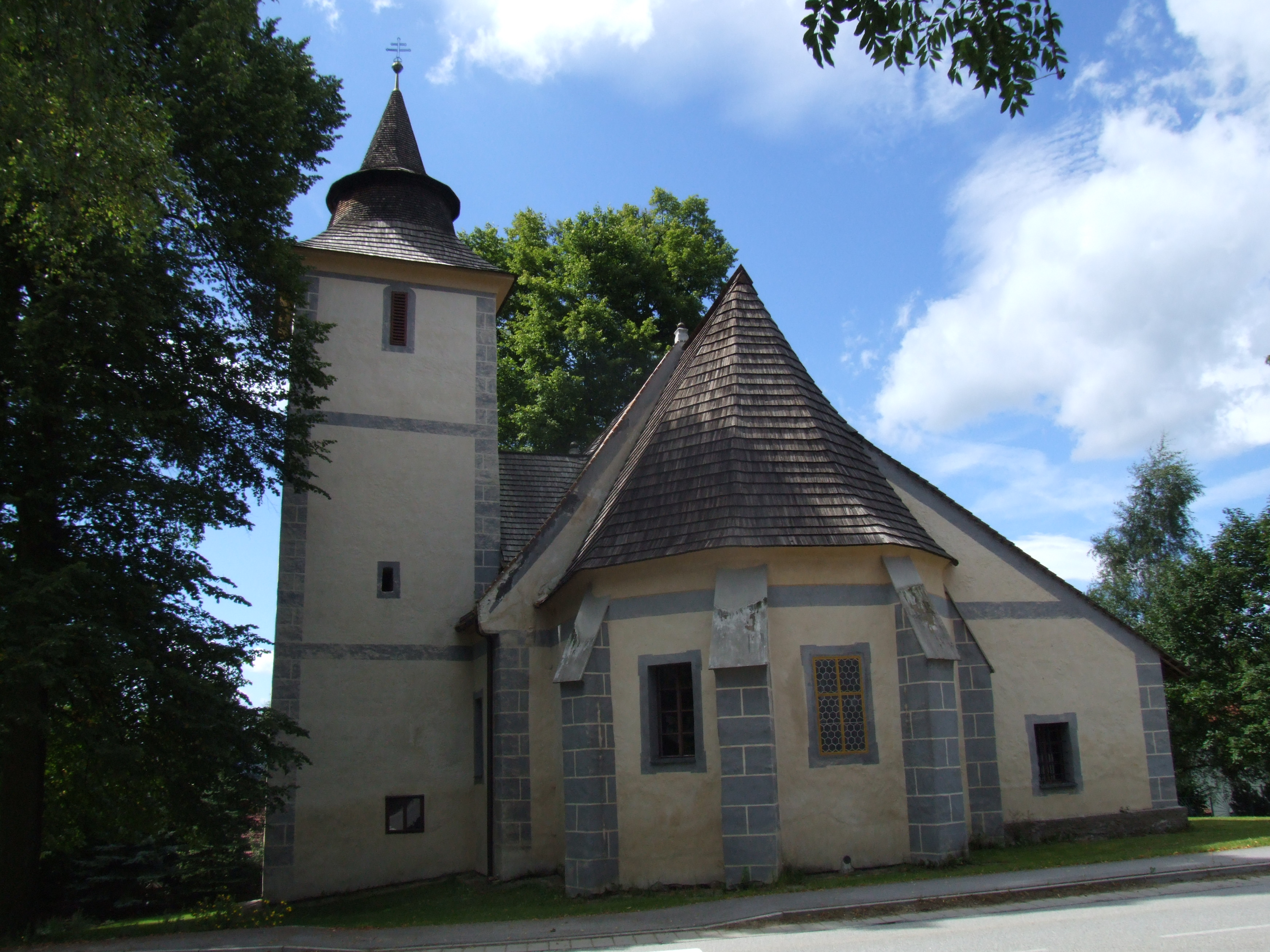 Kostel sv. Anny (Libínské Sedlo), Libínské Sedlo